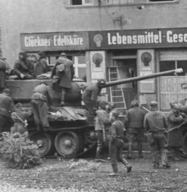 Carri T-34/85 durante la battaglia di Berlino